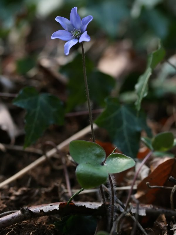 Leberblümchen (Hepatica nobilis)